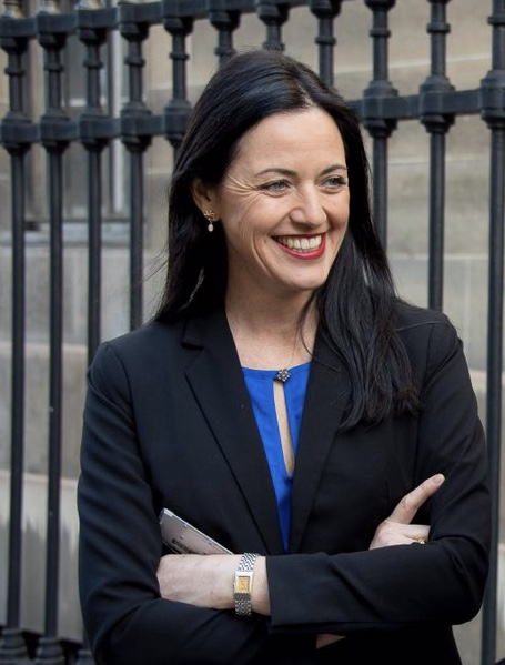 Valérie Bazin-Malgras